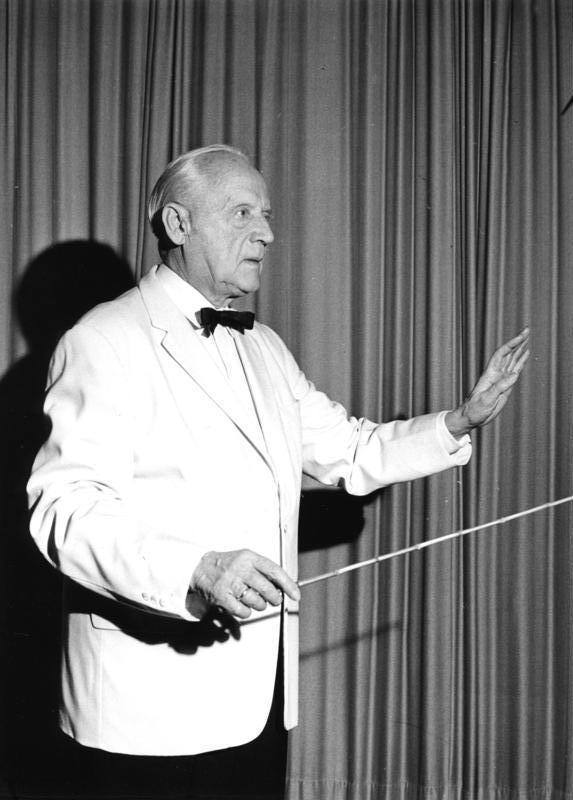 Generalmusikdirektor Hans von Benda